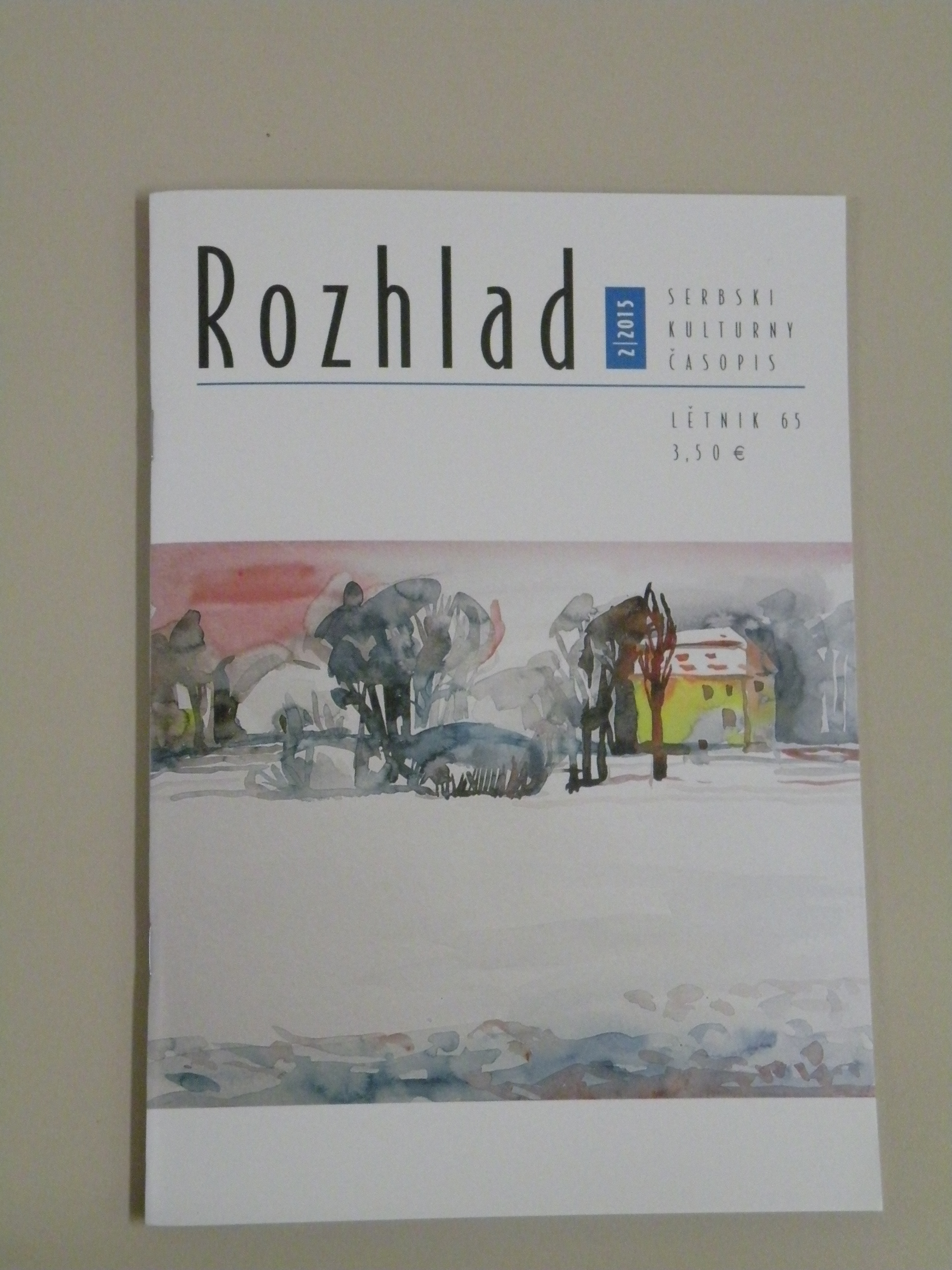 Deckblatt der Ausgabe Nr. 2/2015 mit dem Bild "Schloss Wurschen im Winter" von Isa Brützke